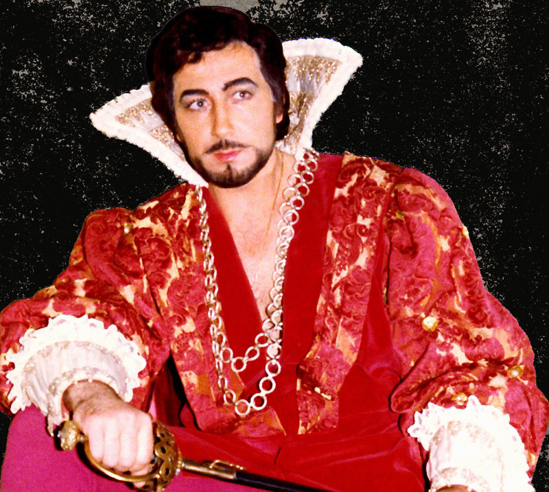 Михаил Светлев като Херцога в "Риголето"